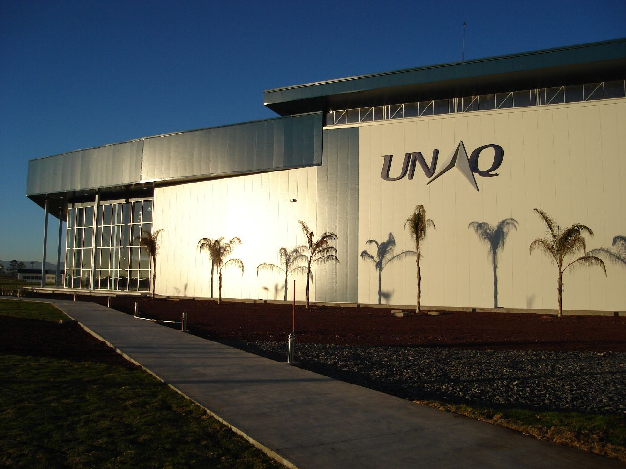 Main Building — Fachada principal de la nave de laboratorios de la Universidad Nacional Aeronáutica en Querétaro, México.